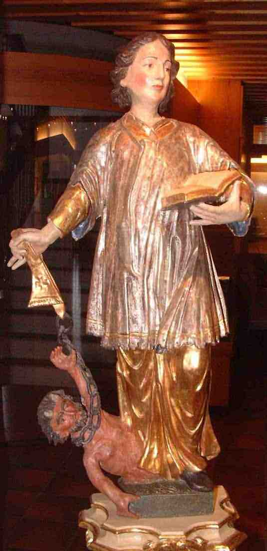 Der Heilige Cyriak Hier gekennzeichnet durch den Teufel an der Kette sowie durch das Gewand eines Diakons (mit den kurzen Ärmeln). Die barocke Figur steht im Altenheim St. Cyriak in Furtwangen. Bild: Eigene Aufnahme 2004 Lizenz GNU FDL